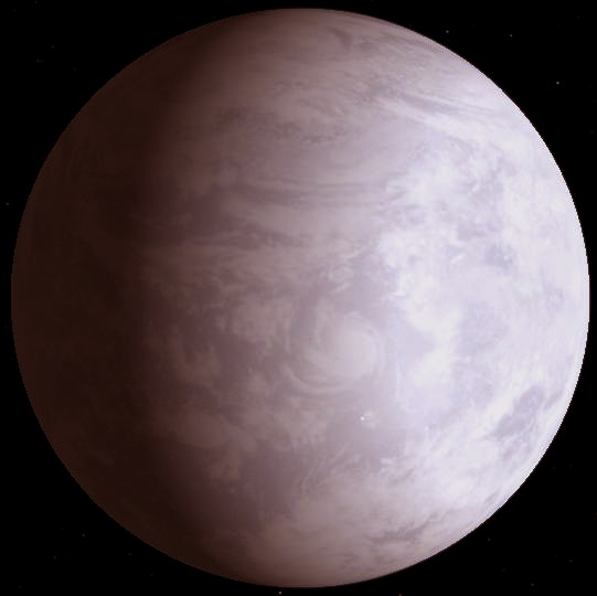 Voici la vue d'artiste de la planète Gliese 581 c (que je surnomme Erythro), la première exoplanète potentiellement habitable découverte. Je l'ai représenté en planète océan avec une épaisse atmosphère où les cyclones géants sont maitres, ne trouvant pas de plage où s'échouer. Le tout est teint en roux rosâtre par le soleil rouge du système.